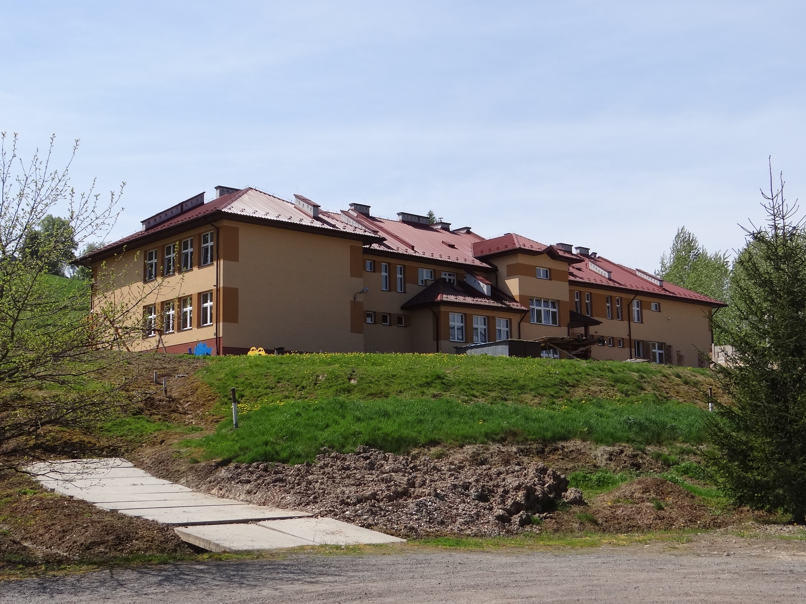 Zespół szkół w Chojniku